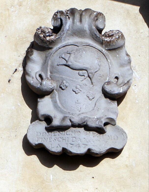 Stemma di Domenico di Egidio Fineschi da Lamole, Podestà di Campi Bisenzio 1747 - foto estratta dal file Commons, "Campi bisenzio, palazzo pretorio, stemmi 02 baldocci +1.jpg", opera di Sailko